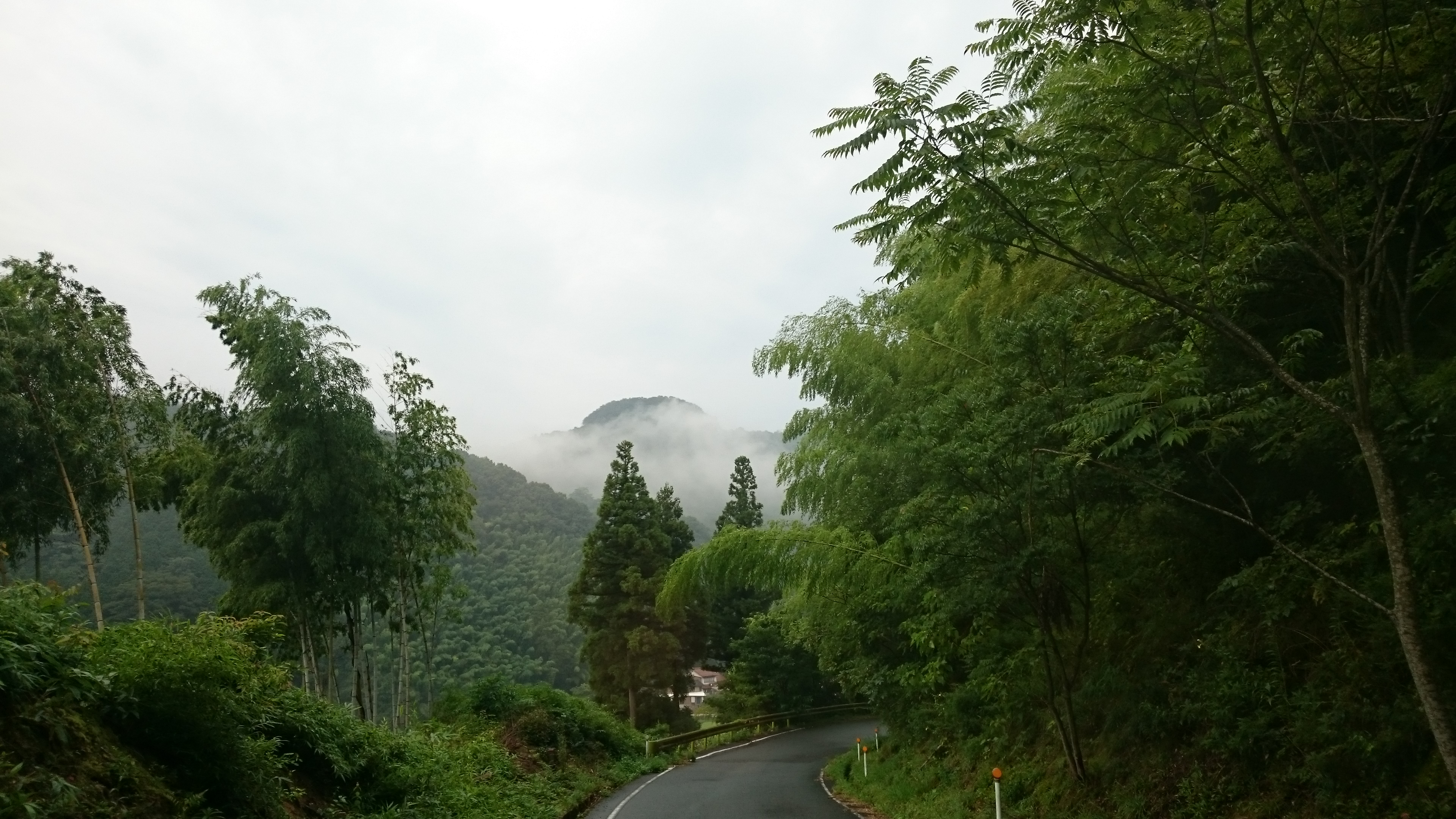 対峙する上の台より比婆山を望む。中央雲の上に見えるのが比婆山。